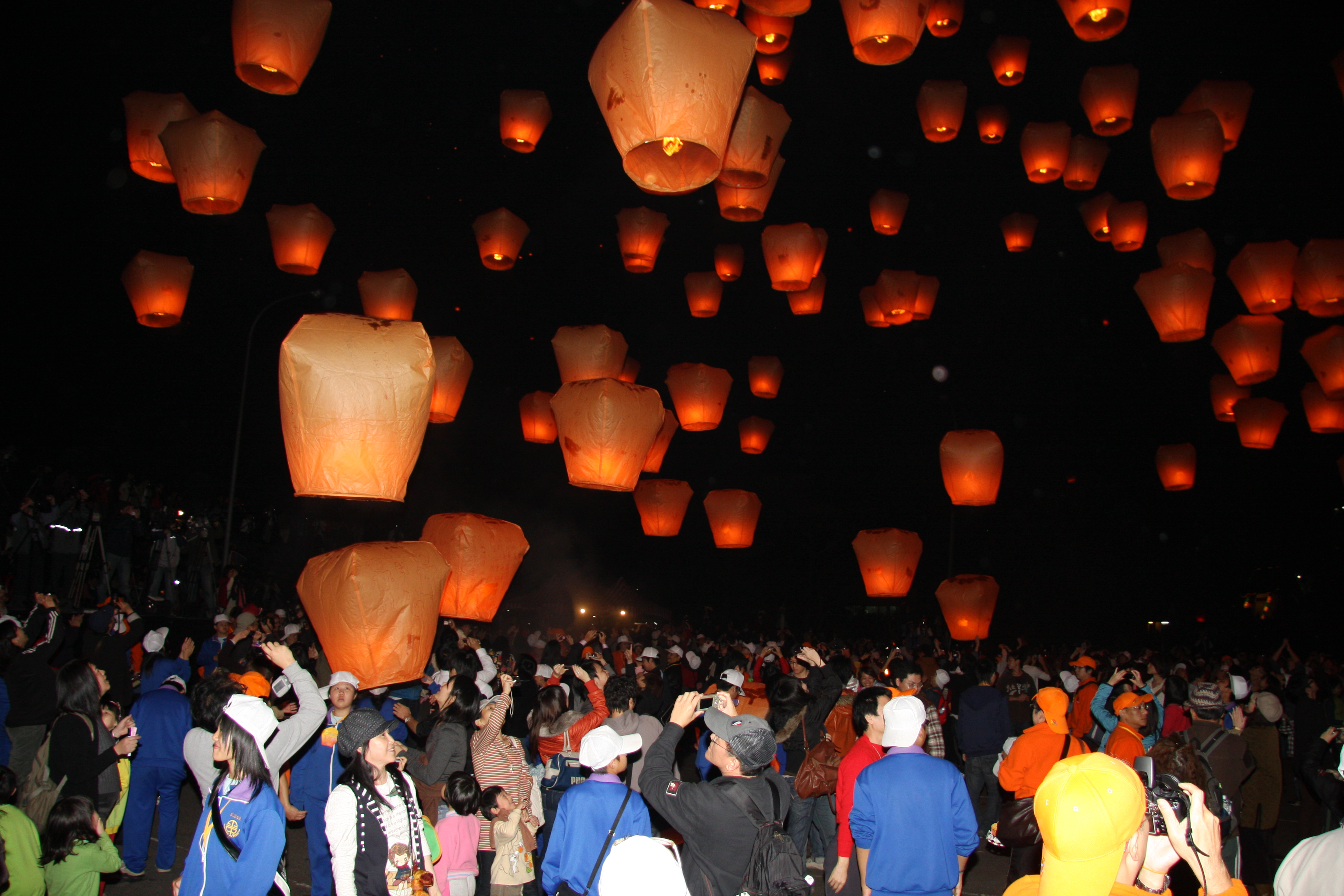 中文（台灣）: 平溪天燈節。